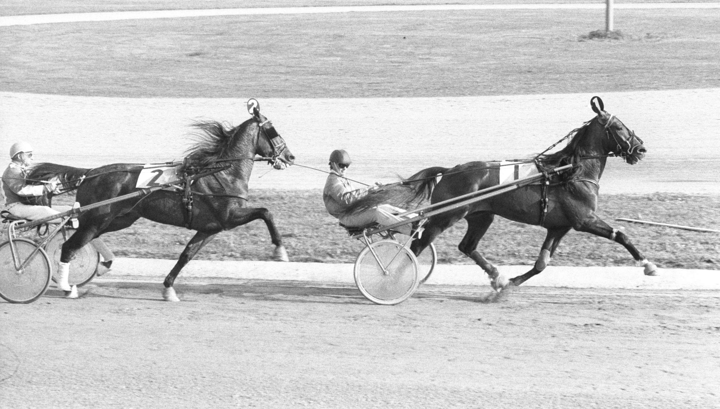 Ego Boy med kusken Ingemar Olofsson vinner Elitloppet på Solvalla 1973.